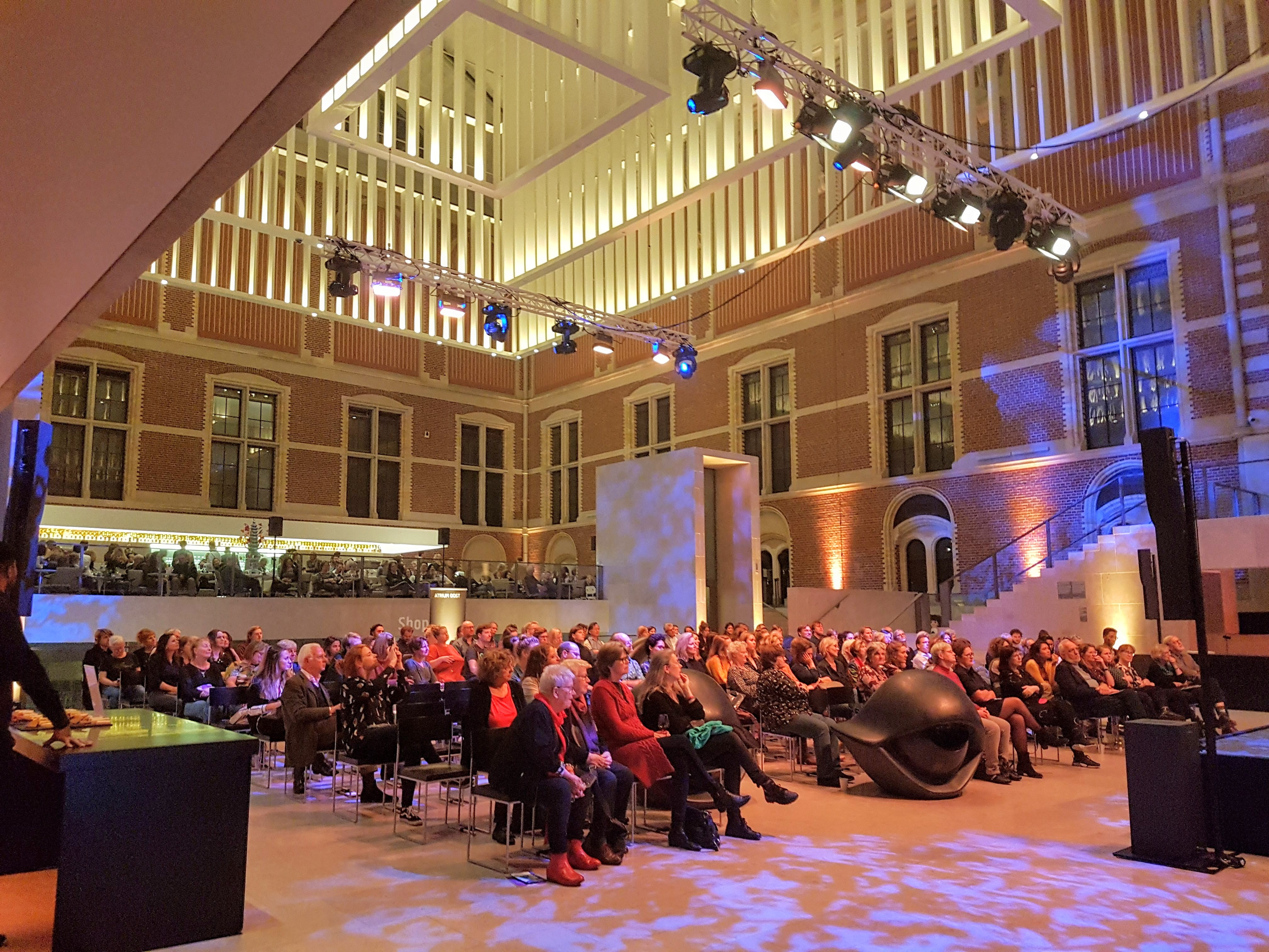 Lezing tijdens de Nacht van de geschiedenis in het Rijksmuseum Amsterdam.